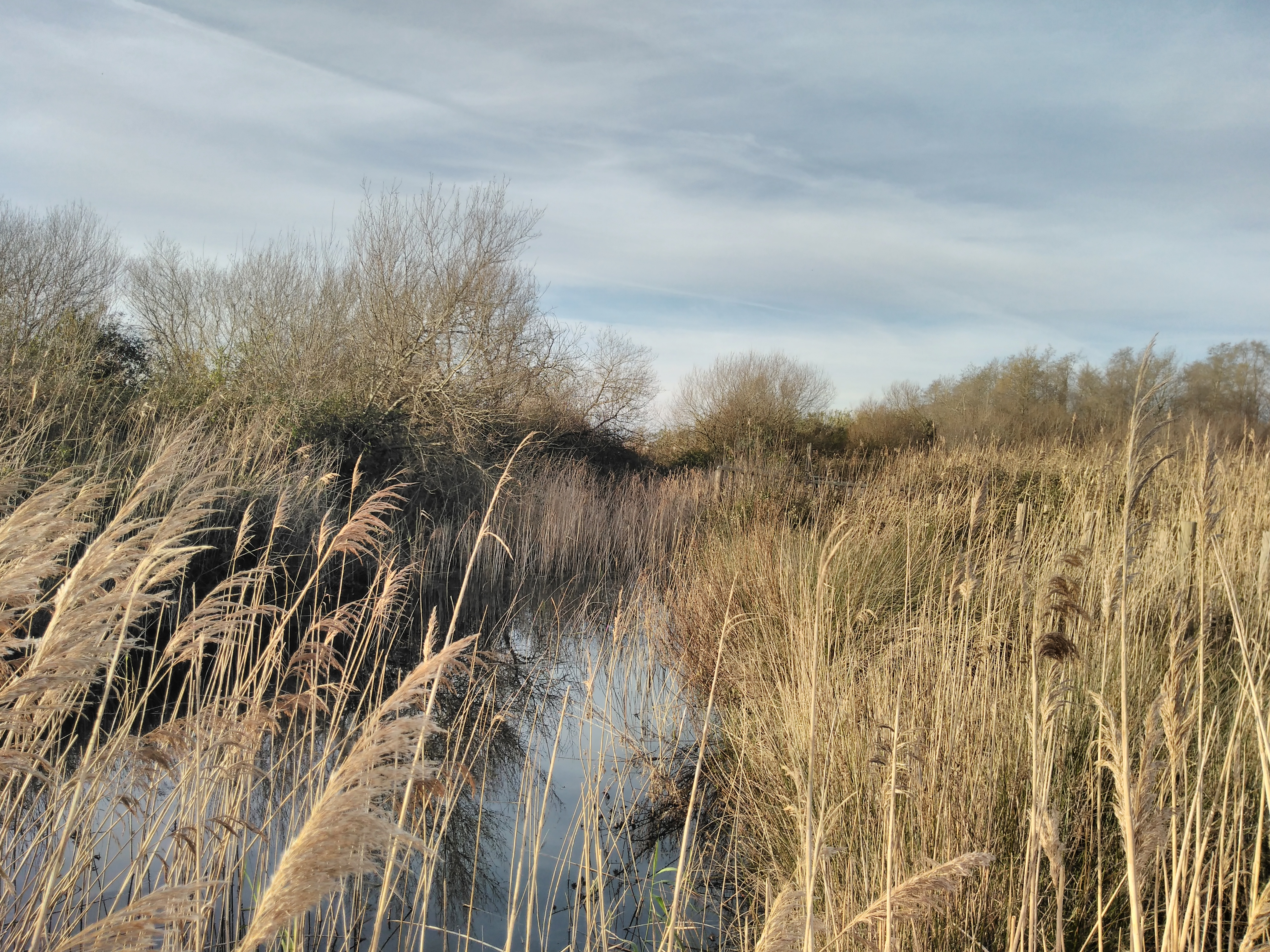 O estado de abandono das Salinas da Junqueira em 2019.